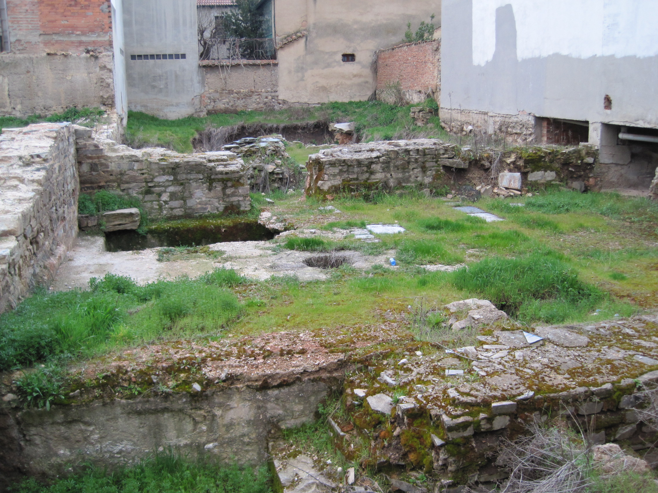 Restos al aire libre de las Termas Mayores de Astorga (León, España).